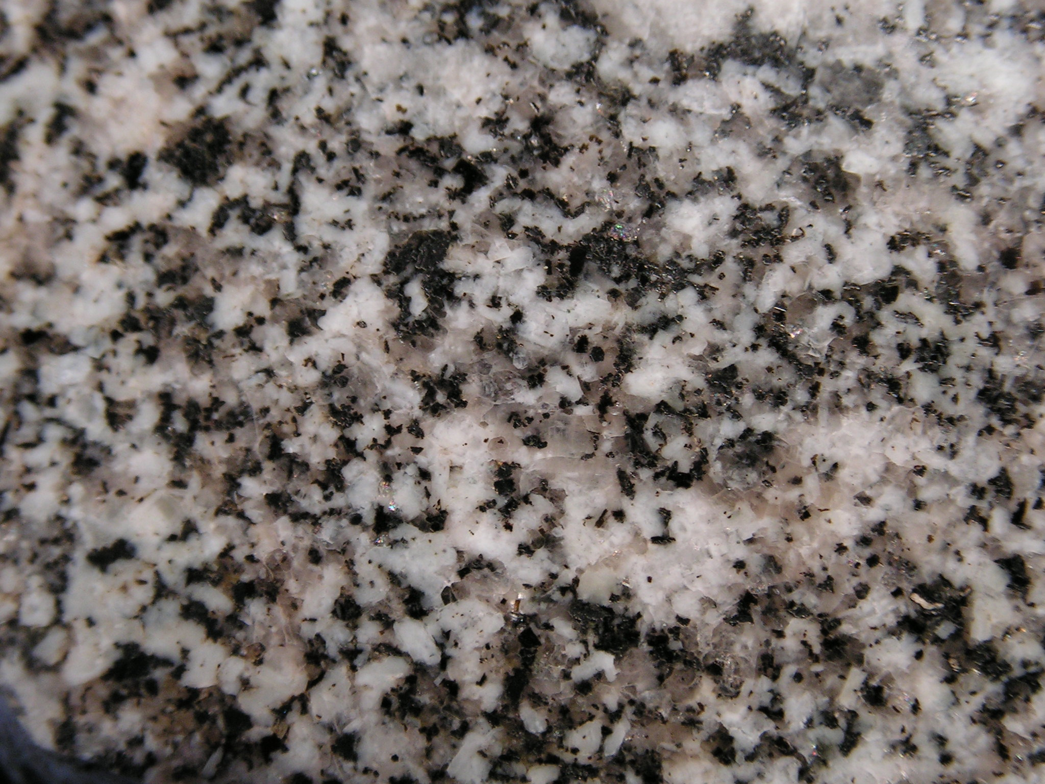 Xenomorphe Quarzkristalle (grau) in Granodiorit